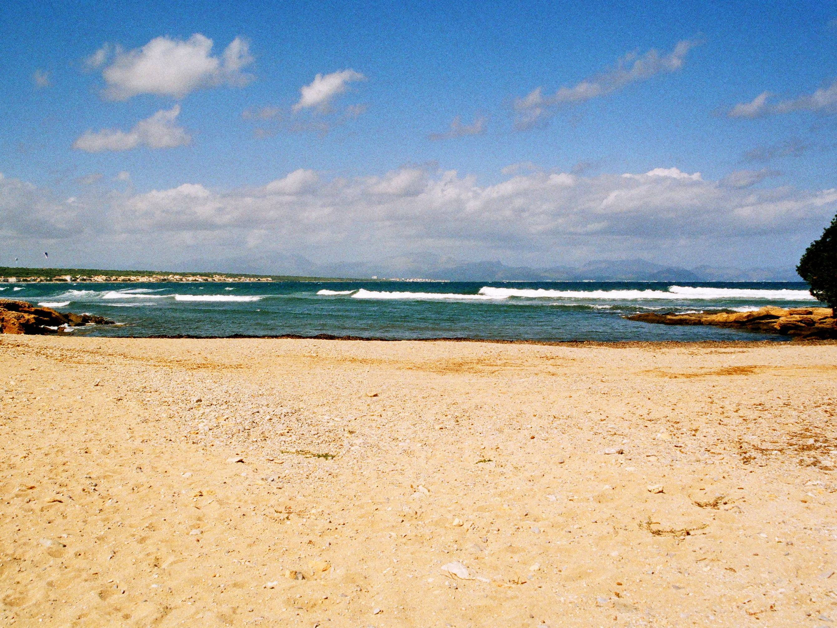 Platja s`Estanyol, Strand an der Bucht von Alcudia, Mallorca (Ballearen)